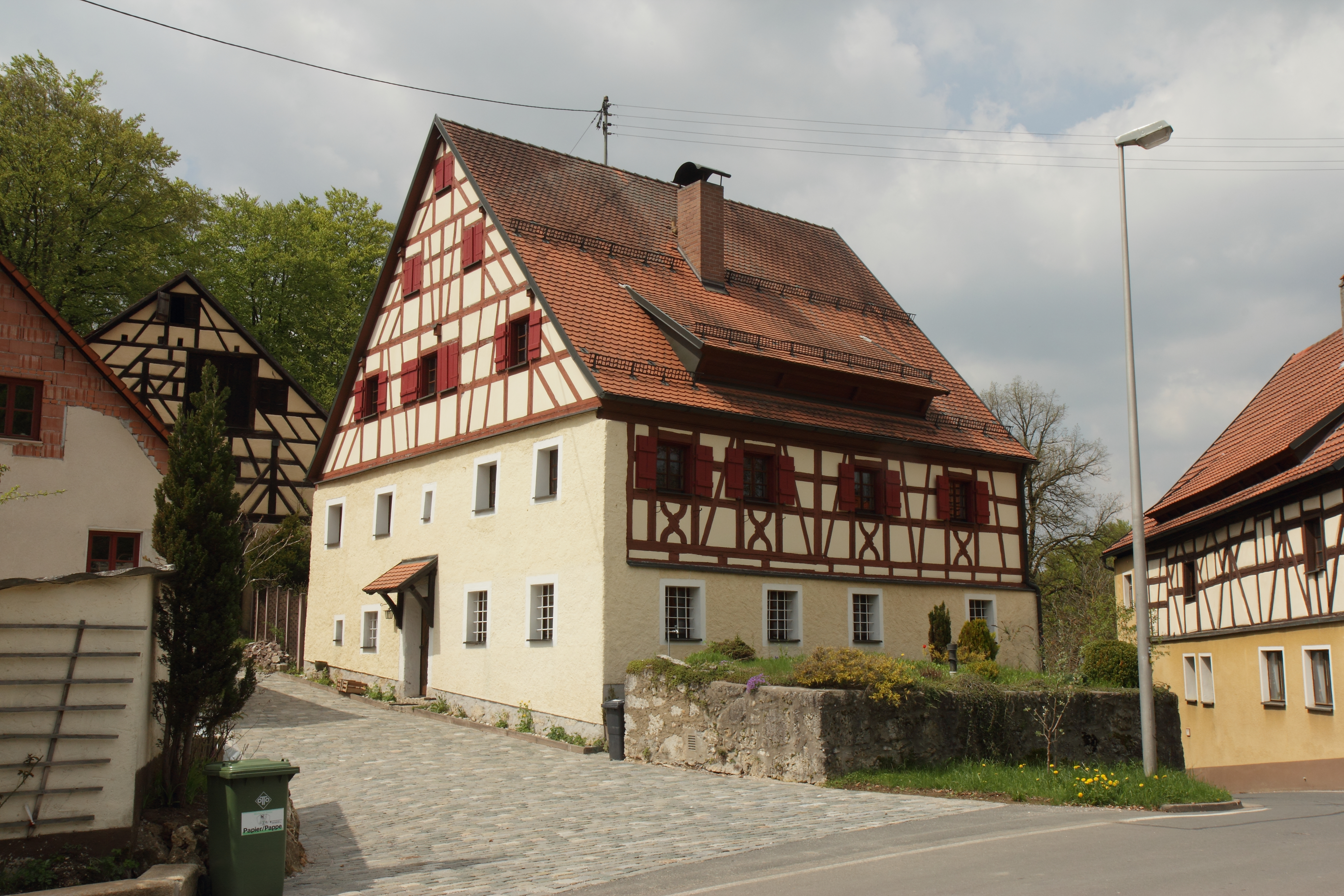 Strahlenfels 12a - Ehemaliges Wohnstallhaus, Obergeschoss mit reichem Fachwerk, 17./18. Jahrhundert